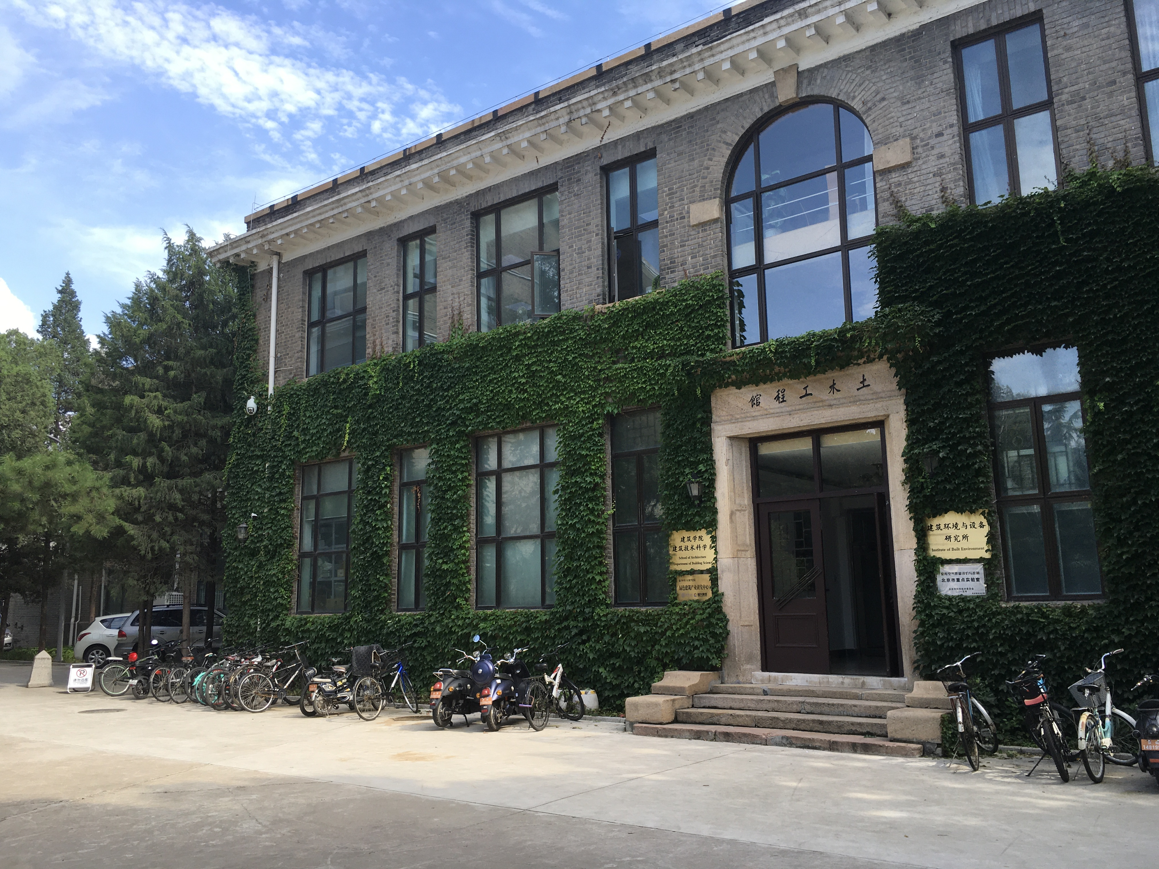 中文（中国大陆）: 清华大学土木工程馆